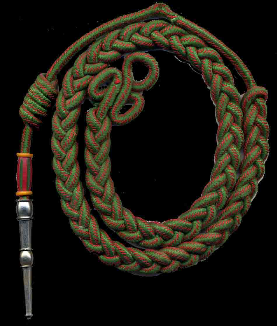 Description fourragère aux couleurs du ruban de la croix de guerre 1914-1918 avec olive aux couleurs du ruban de la croix de guerre 1939-1945. Date1945Sourcecollection personnelleAuthorfantassin 72Permission(Reusing this file) libre de droits fourragère aux couleurs du ruban de la croix de guerre 1914-1918 avec olive aux couleurs du ruban de la croix de guerre 1939-1945.